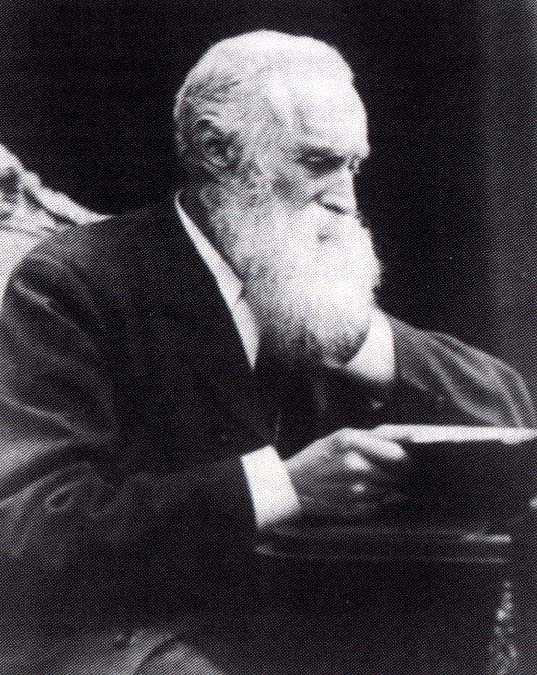 William Gibson Sloan, Evangelist in Schottland, auf den Shetland-, Orkney- und den färöischen Inseln